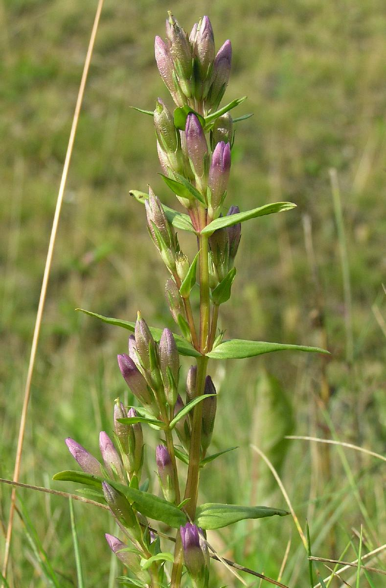 Gentianella amarella (sv: ängsgentiana), road ditch S of Ulricehamnsrondellen, Falköping, Sweden